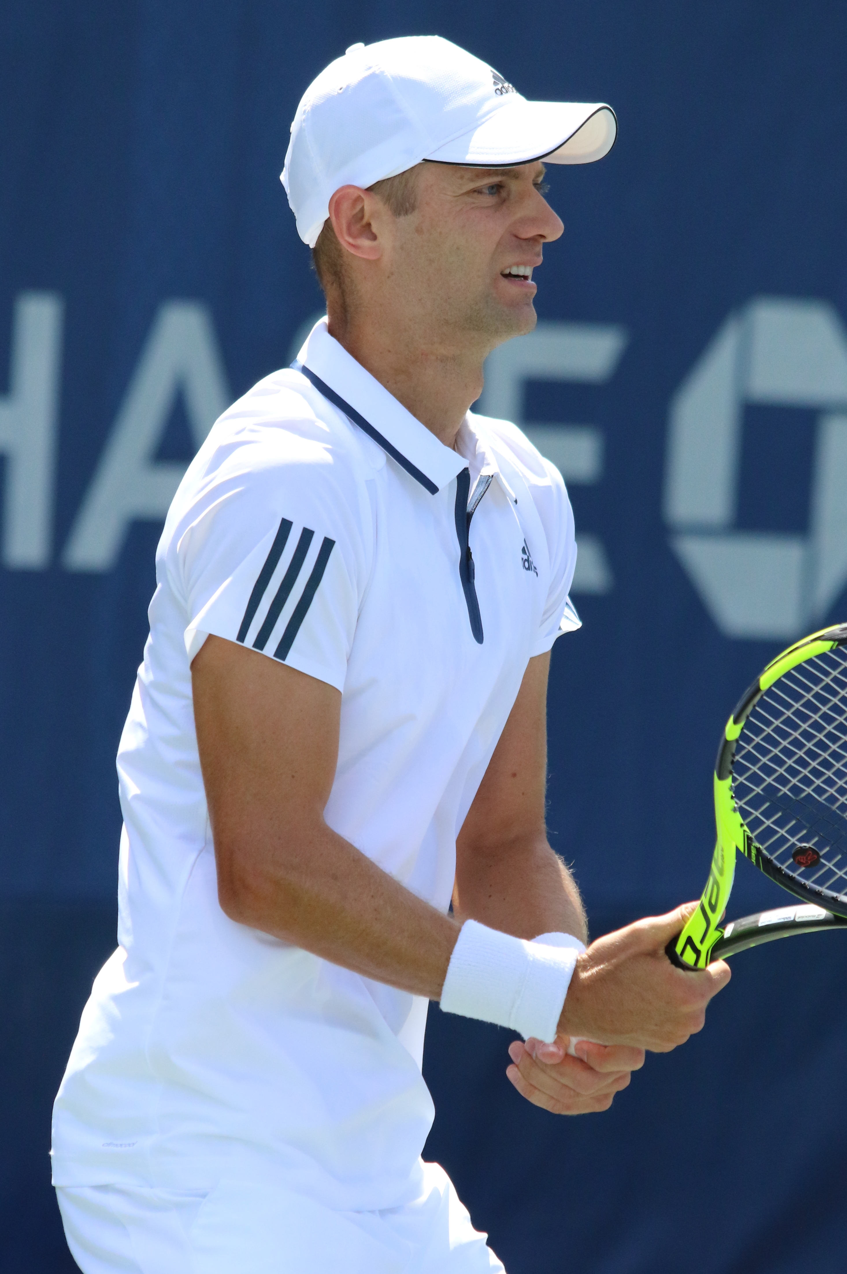 Fyrstenberg US16 (32)